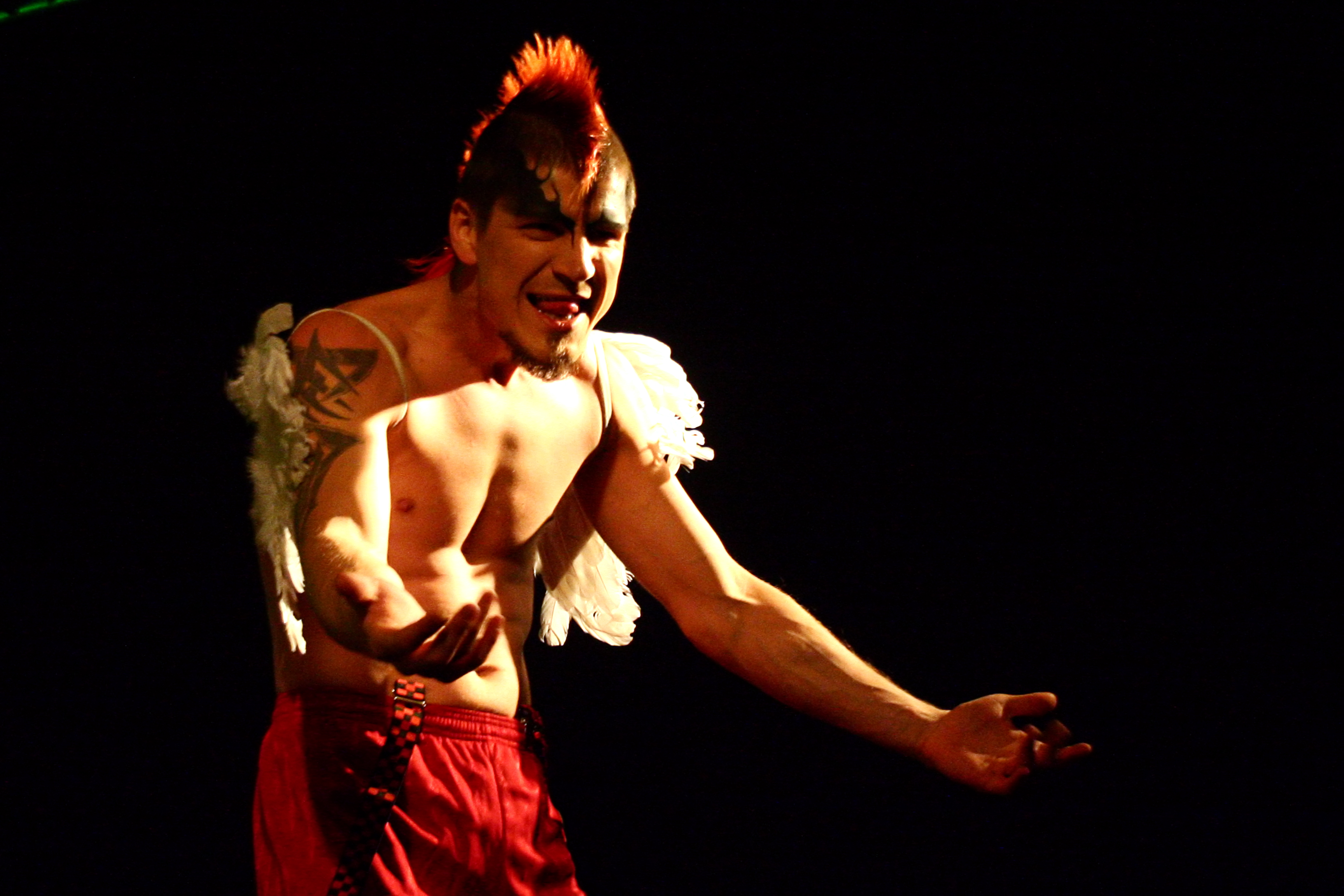 Михаил Поздеев, группа "Скворцы Степанова" на фестивале "GOLDWING против наркотиков"